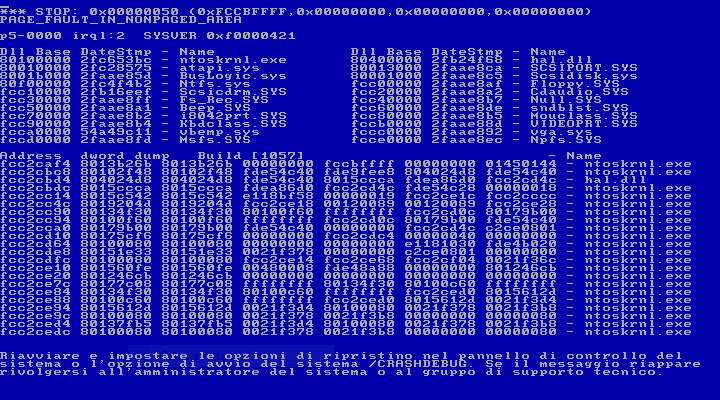 Screenshot della BSOD di Windows NT 3.51 all'avvio, scattato dal sottoscritto in una macchina virtuale. Screenshot of a Windows NT 3.51 BSOD during startup, shot by myself in a virtual machine.